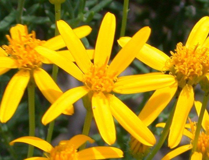 Damianita daisy (Chrysactinia mexicana) close up